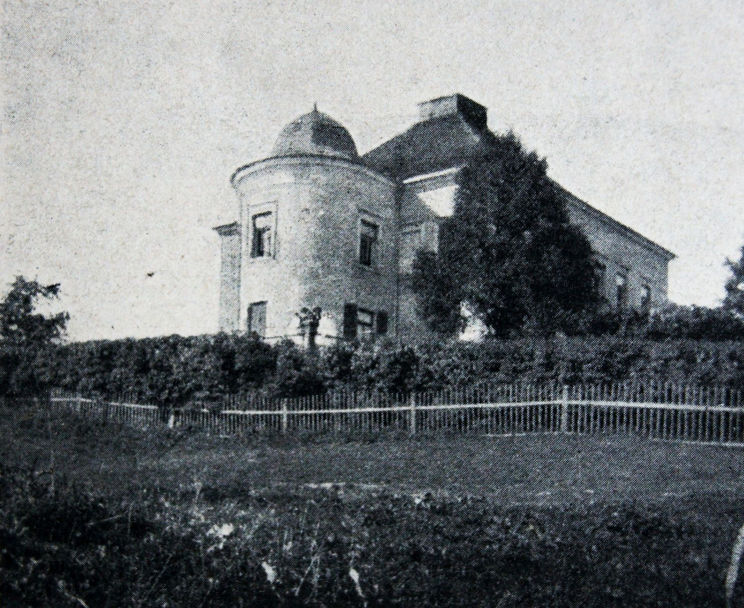 Dwór w Bolminie photograph with: „Tygodnik Ilustrowany” 1906